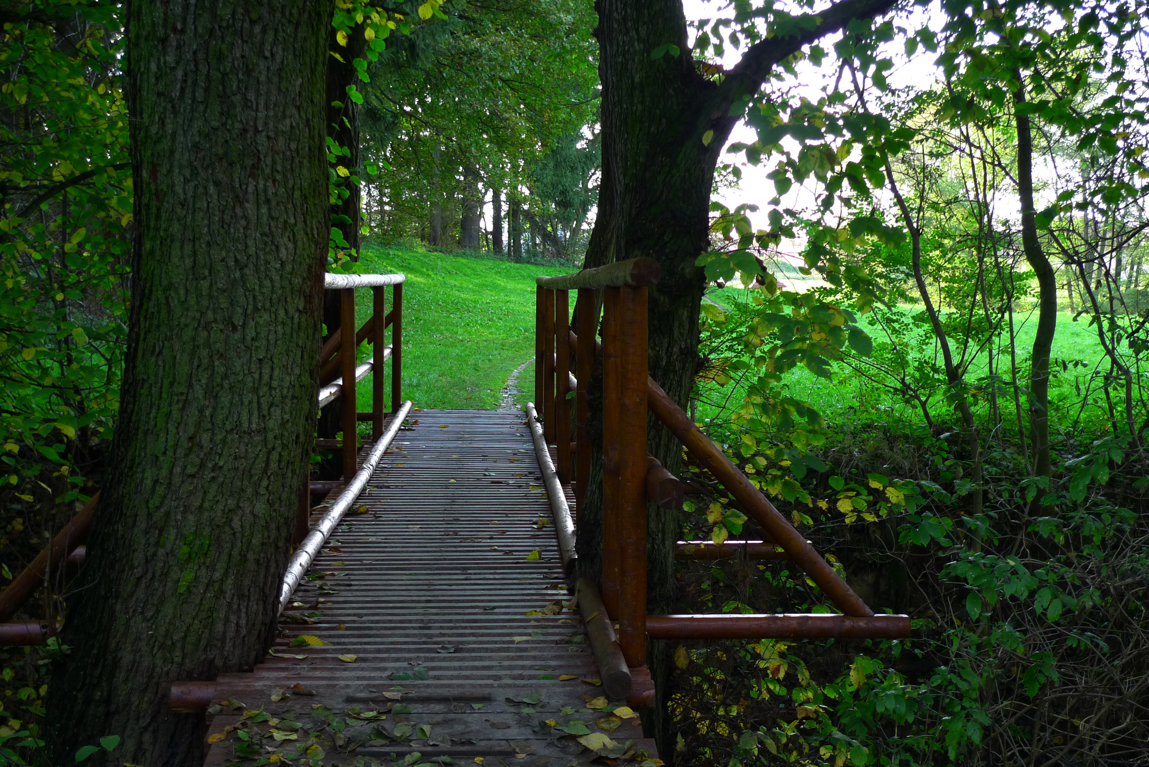 lávka přes Botič v blízkosti Křeslic